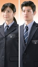 法務教官の制服